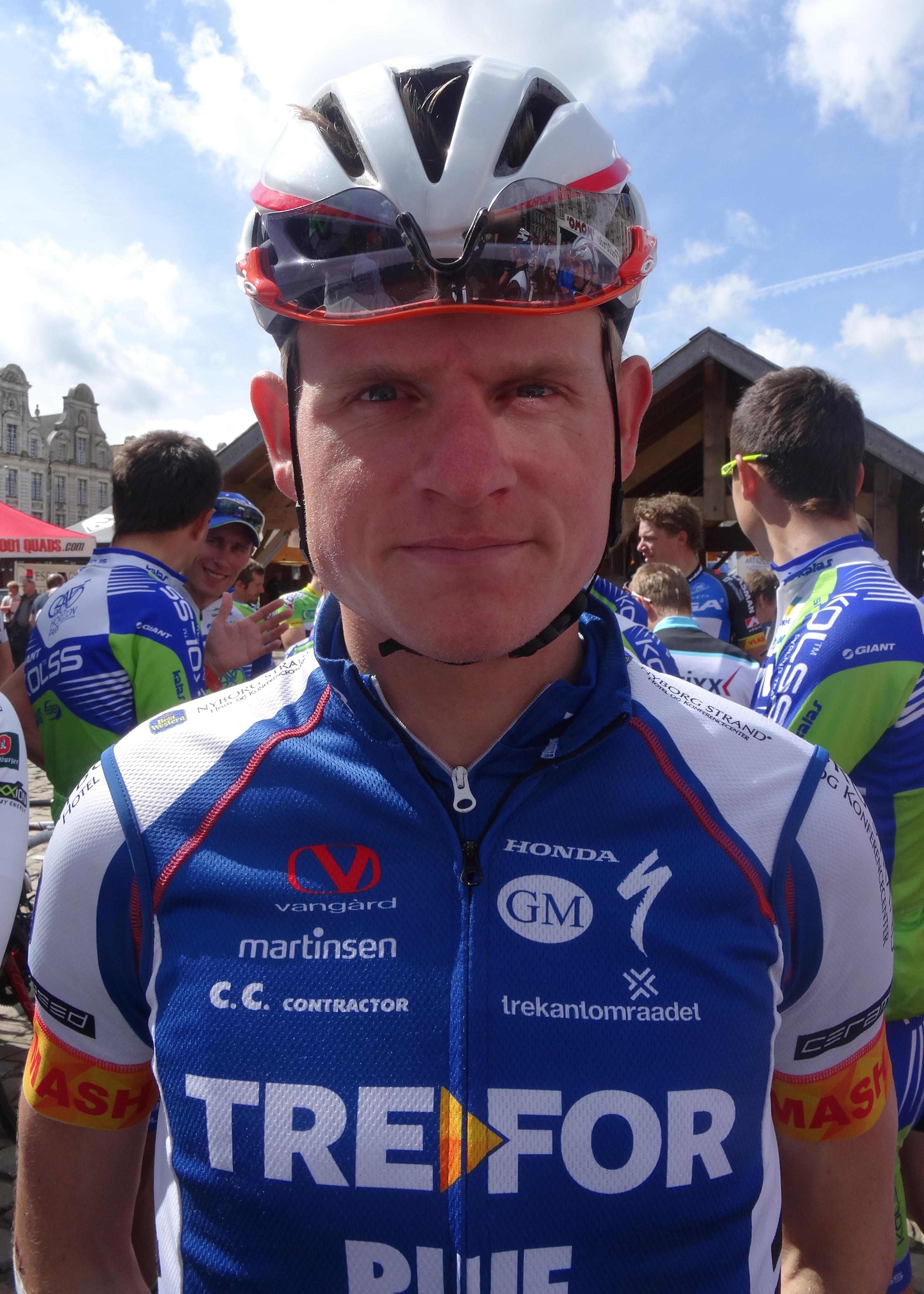 Reportage photographique réalisé le dimanche 25 mai 2014 à l'occasion du départ et de l'arrivée de la troisième étape du Paris-Arras Tour 2014 à Arras, Pas-de-Calais, Nord-Pas-de-Calais, France. Depicted person: Rasmus Guldhammer Depicted team: Trefor-Blue Water